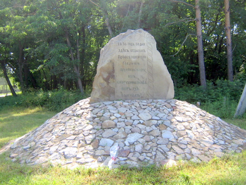 Пам'тний камінь у Великоанадольському лісі на честь того, що там відпочивав Архієпископ Гавриїл